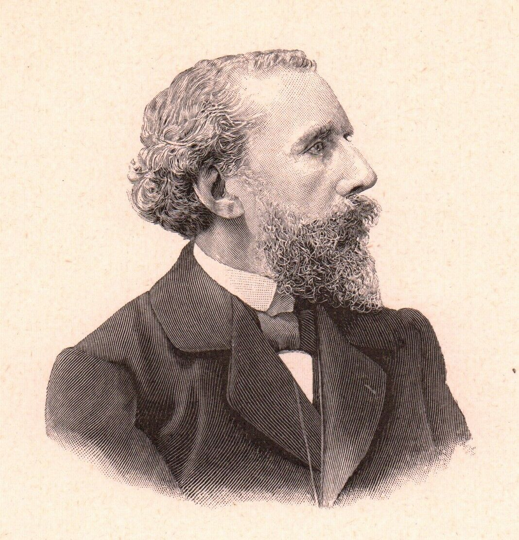 French poet Albert Mérat (1840-1909)